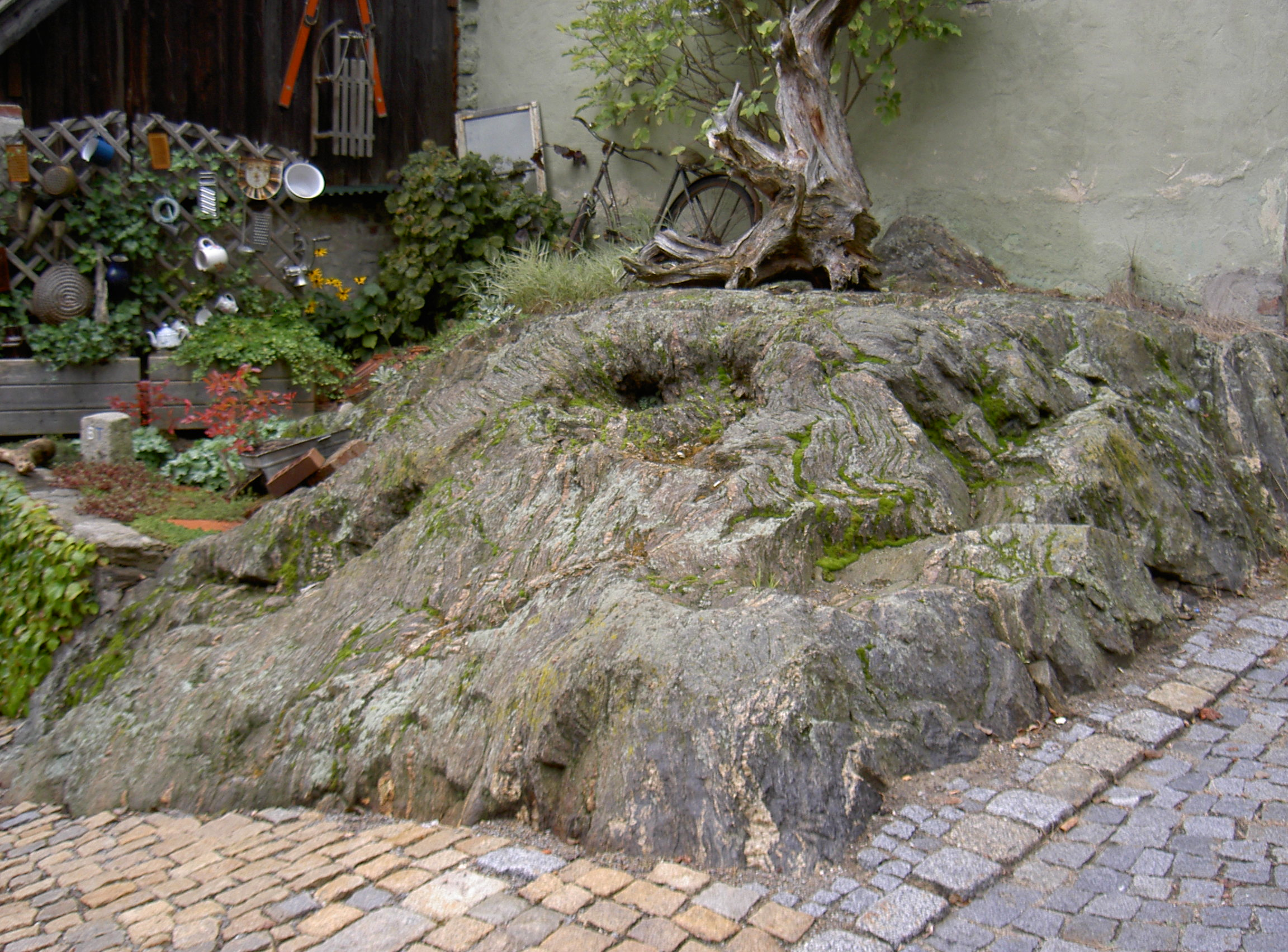 Waldmünchen Pfarrgasse 6, Felsfundament, Geotop